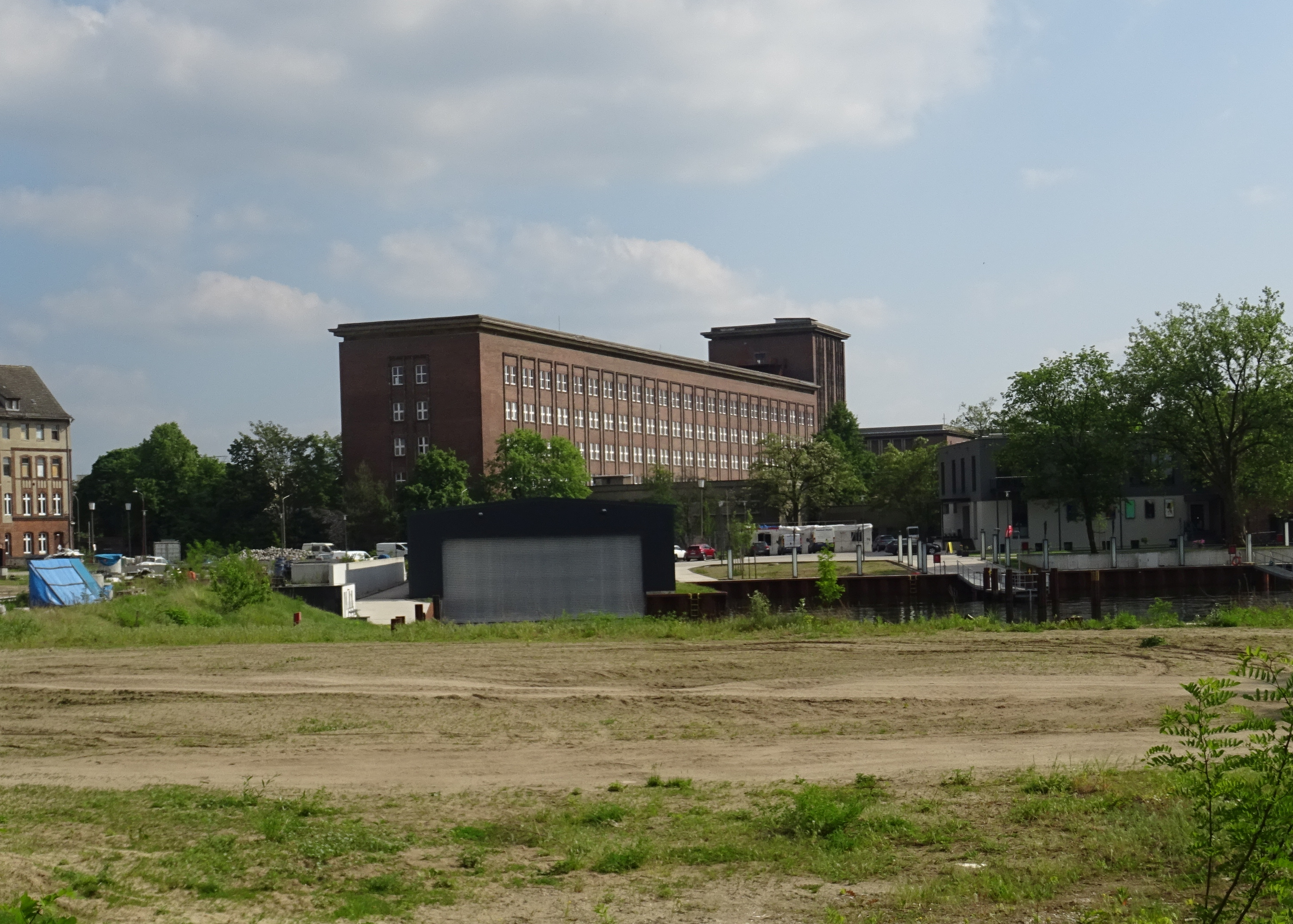 Gelände des ehemaligen Kraftwerks Rummelsburg mit dem nach 2000 angelegten Hafen. Im Hintergrund das Funkhaus Nalepastraße von Norden